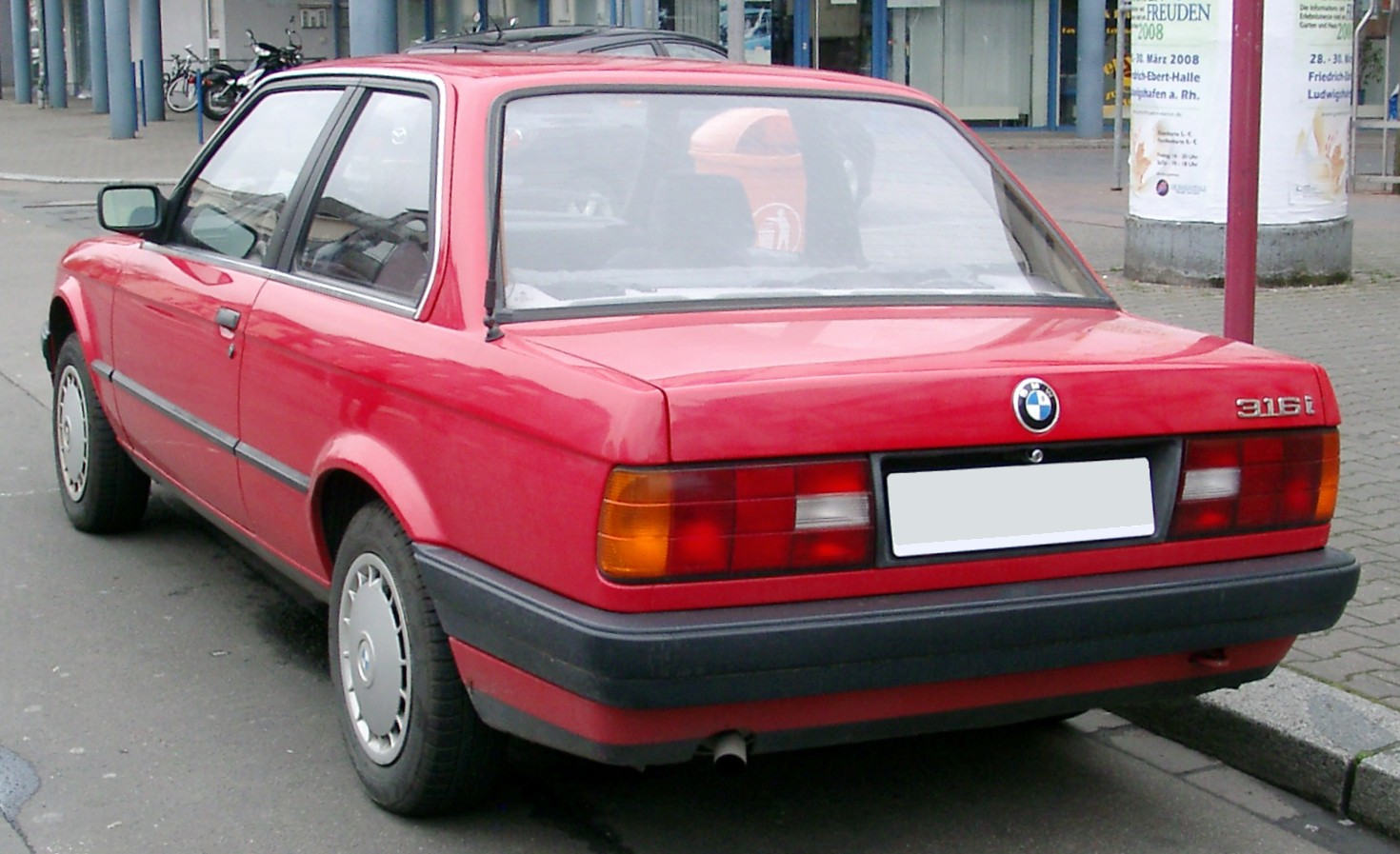 BMW E30